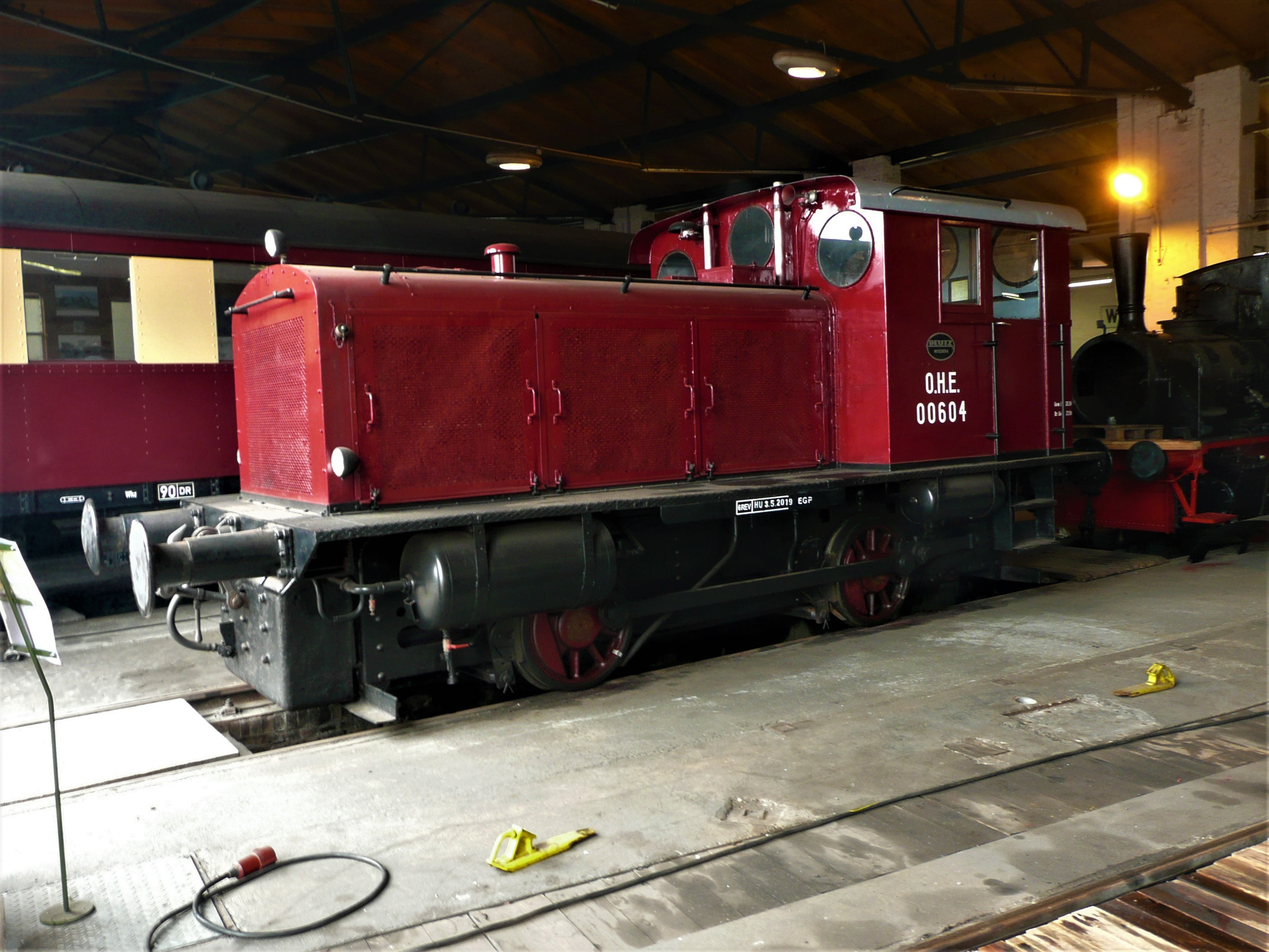 erhaltene Lokomotive KHD OMD 130 R (KHD Fabriknummer 12694, 1935) im historischen Lokschuppen Wittenberge